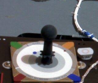 Cadran solaire sur le robot Spirit servant à l'étalonnage des couleurs des photographies.